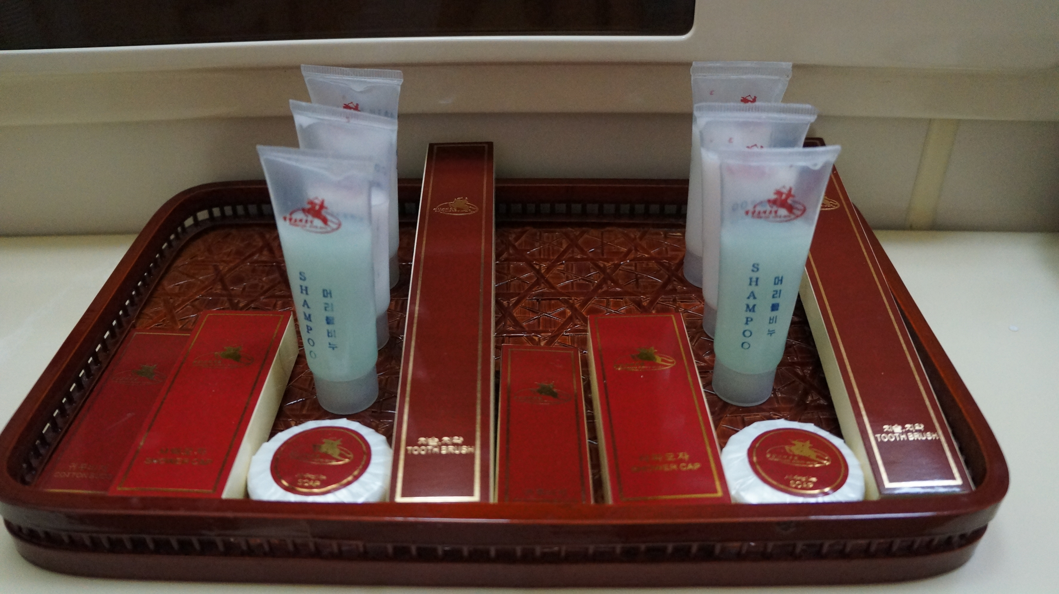 Pyongyang, North Korea DPRK